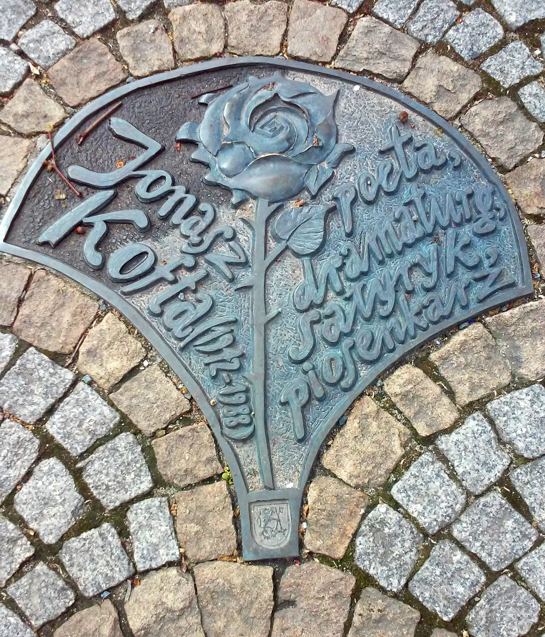 Legnica, Aleja Gwiazd Satyrykonu, tablica pamiątkowa - Jonasz Kofta